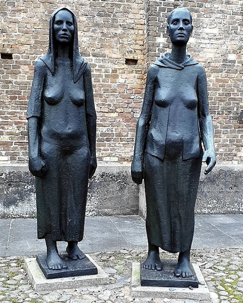 Mahn- und Gedenkstätte KZ Ravensbrück - Denkmal "Frauengruppe" von Will Lammert am Krematorium vor der Mauer der Nationen